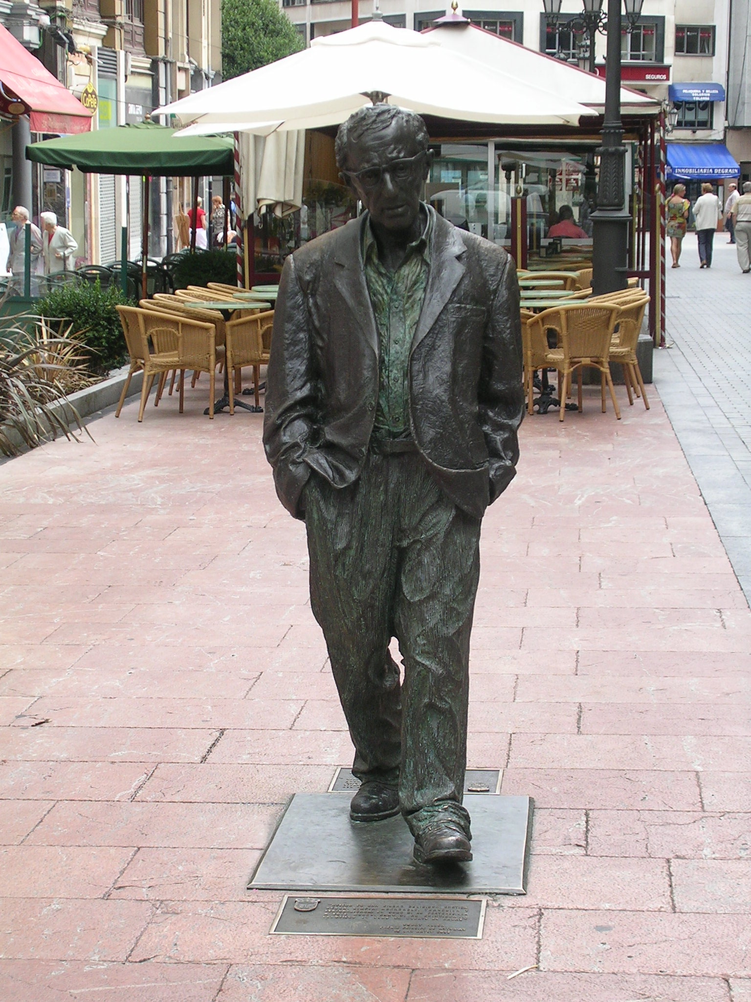 Estatua dedicada a Woody Allen en Oviedo, Asturias.